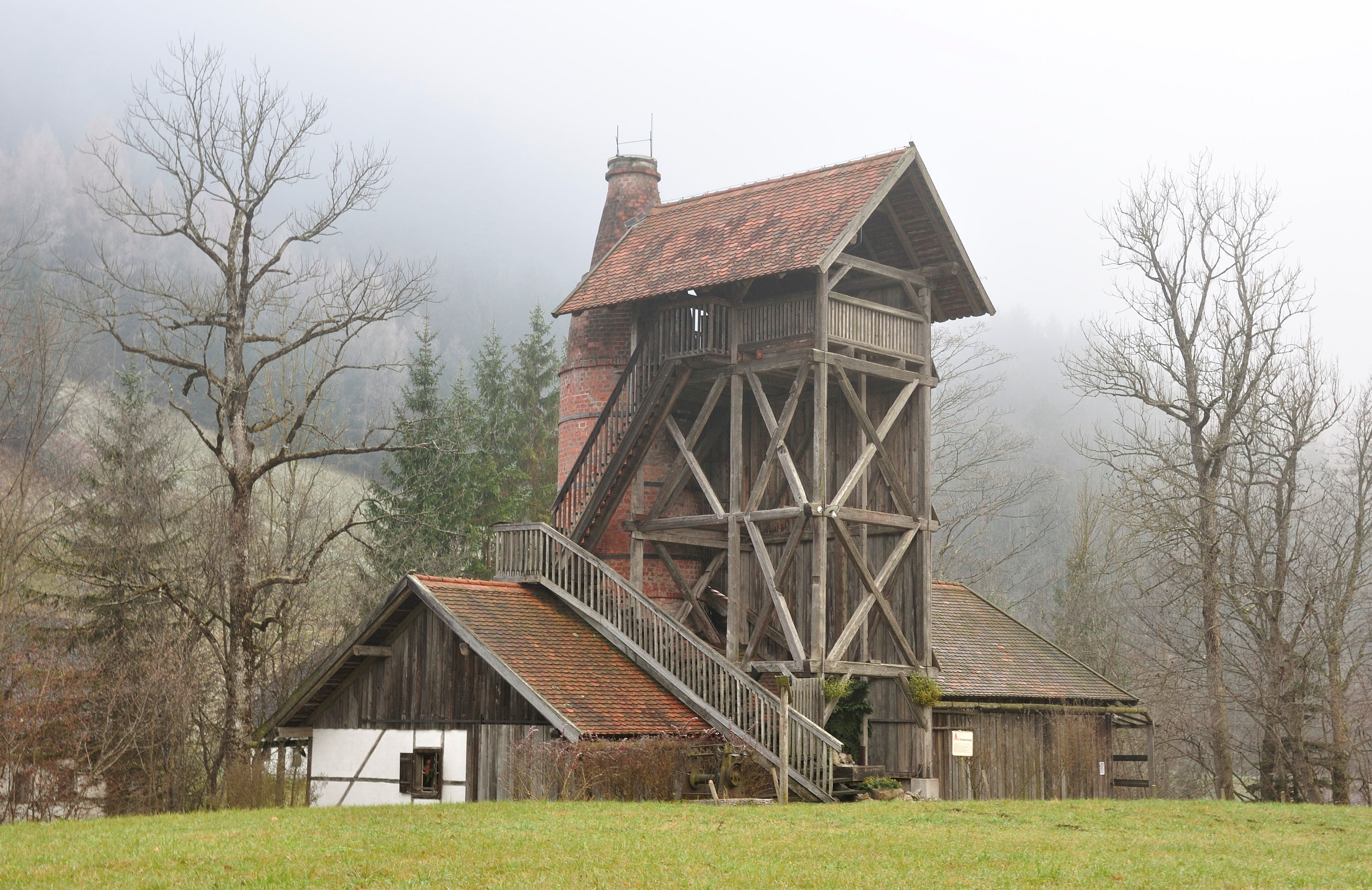 Kalkbrennofen, Krapfenmühle